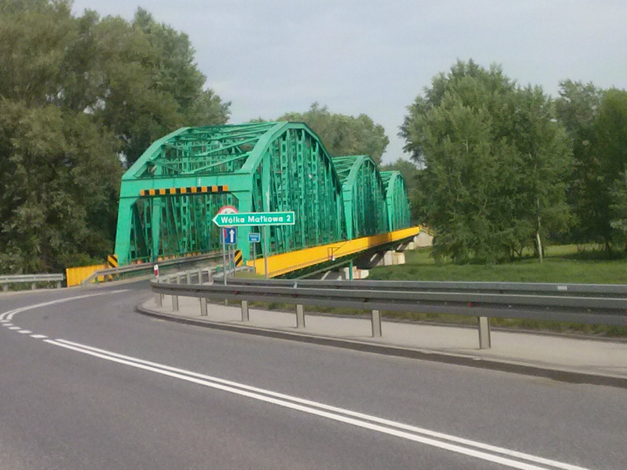 Most na Wisłoku w Tryńczy